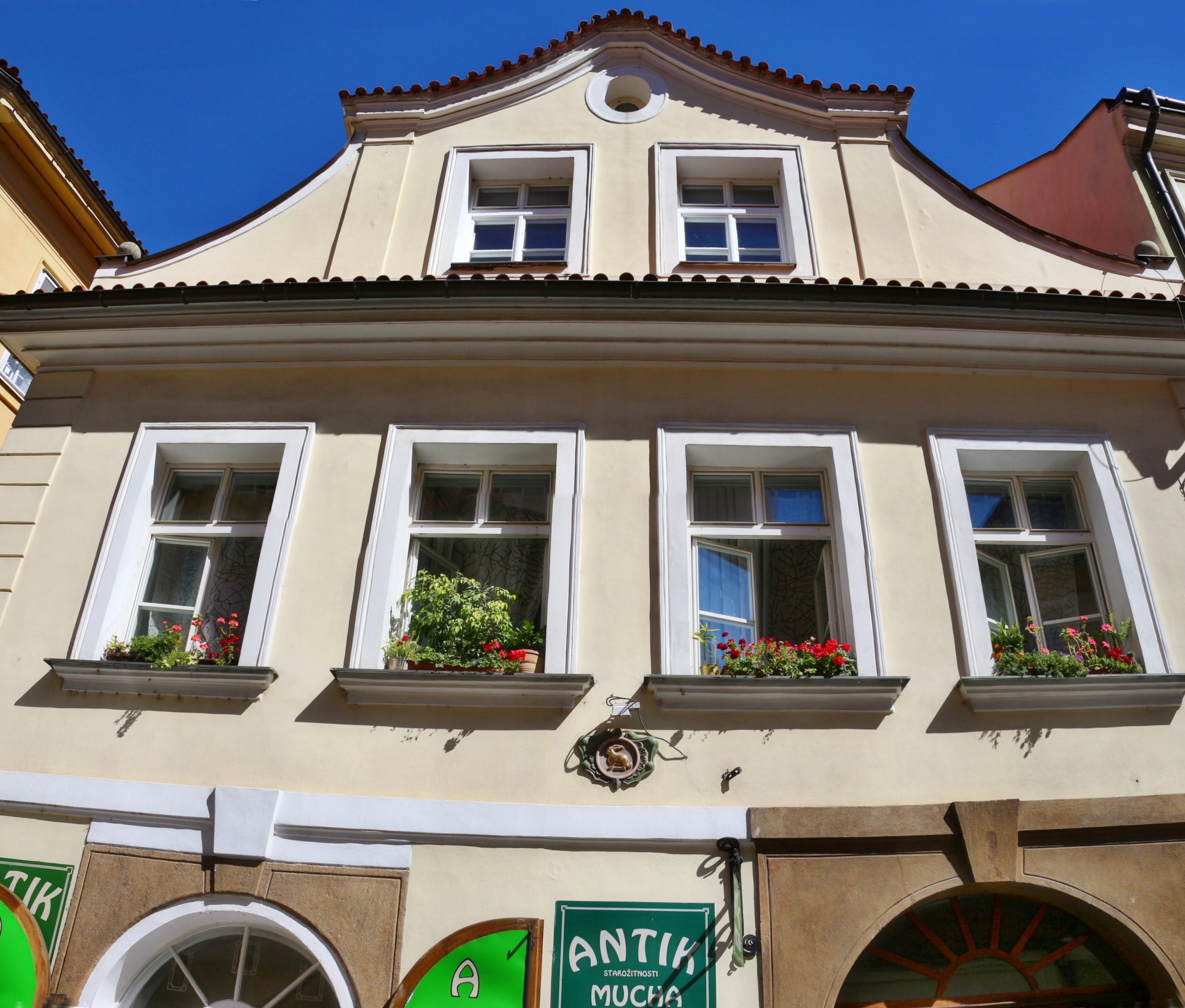 Staré Město Liliová U zlatého zajíce